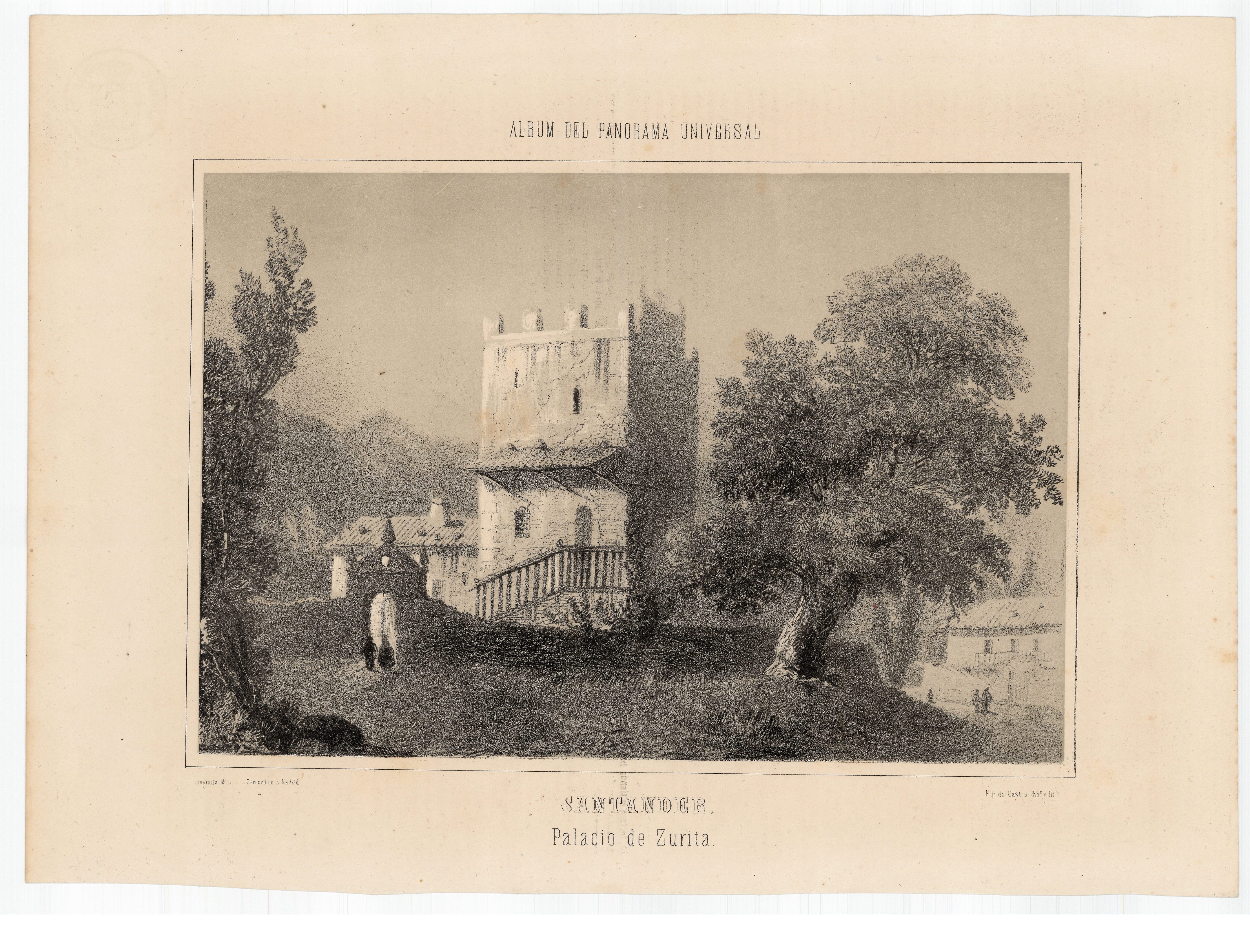 Santander. Palacio de Zurita / Pedro Pérez de Castro dib. y lit.